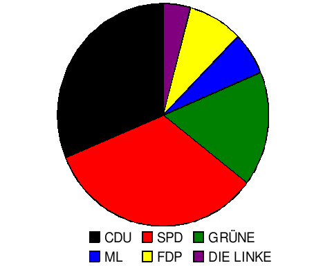 Sitzverteilung im Mannheimer Gemeinderat Seating in the town council of Mannheim, Germany